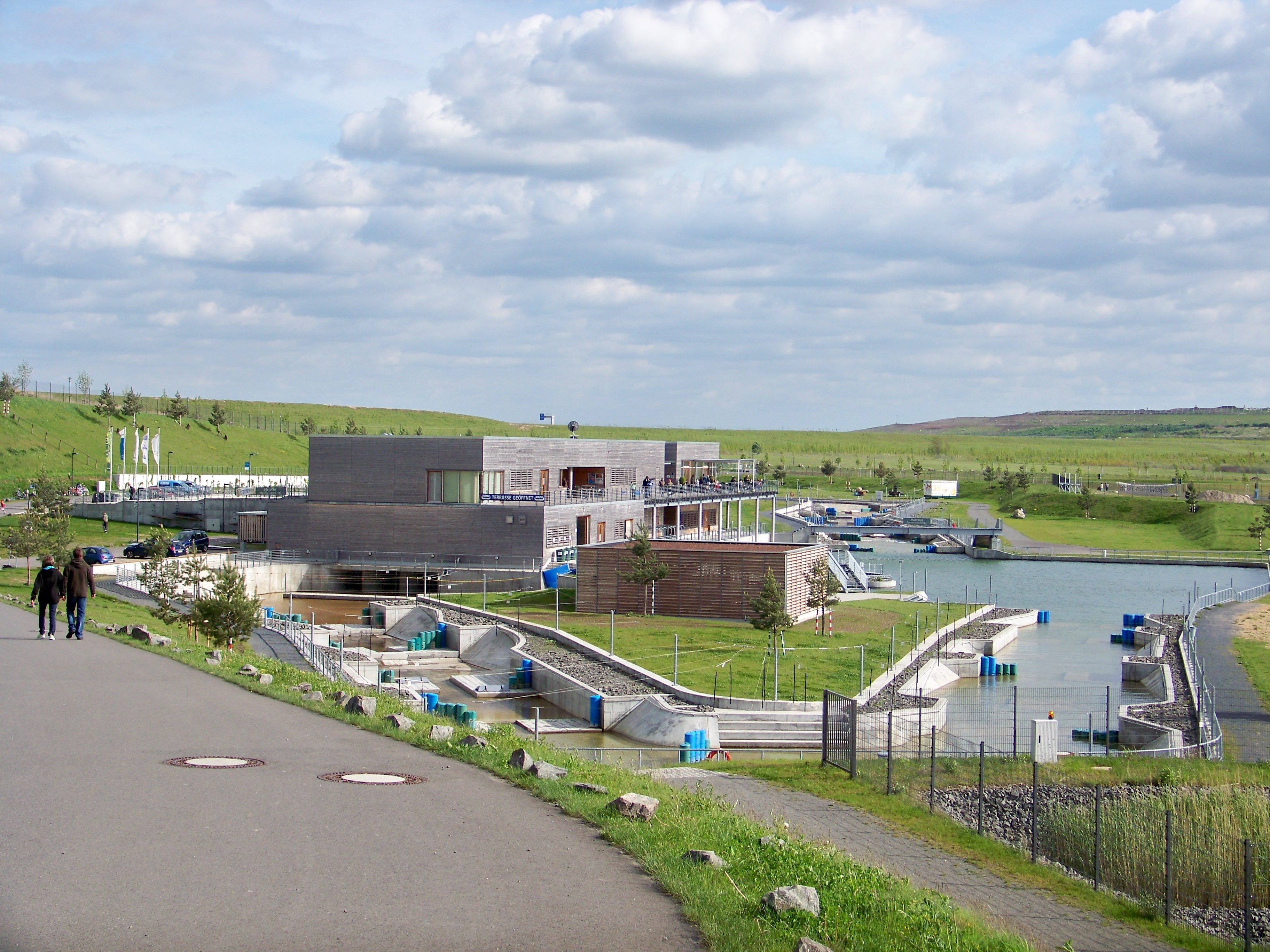 Kanupark und Wildwasseranlage am Markkleeberger See südlich von Leipzig, Deutschland